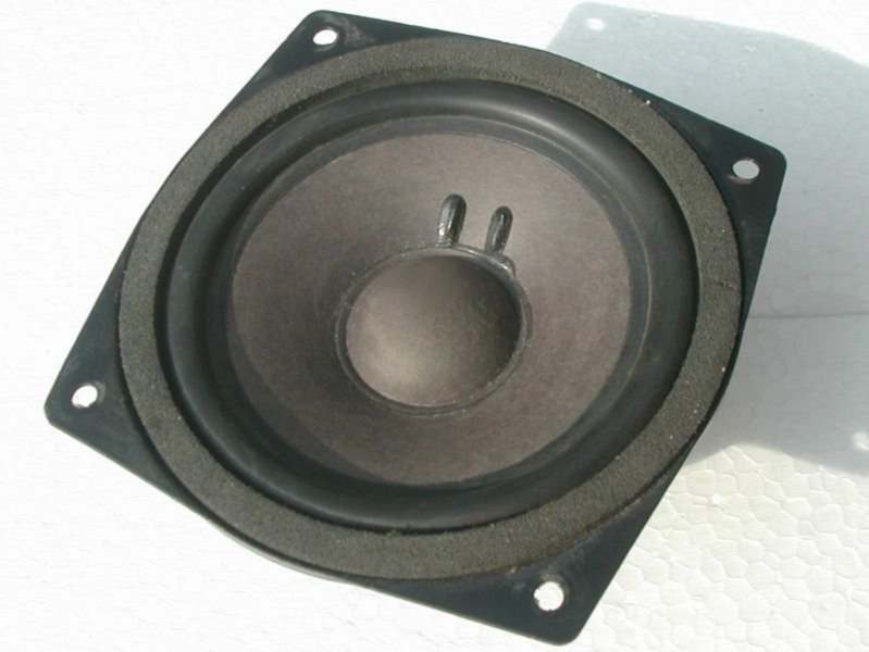 Photo eines einfachen Konuslautsprechers. Nachbearbeitung: Gespiegelt, Beschädigung retuschiert